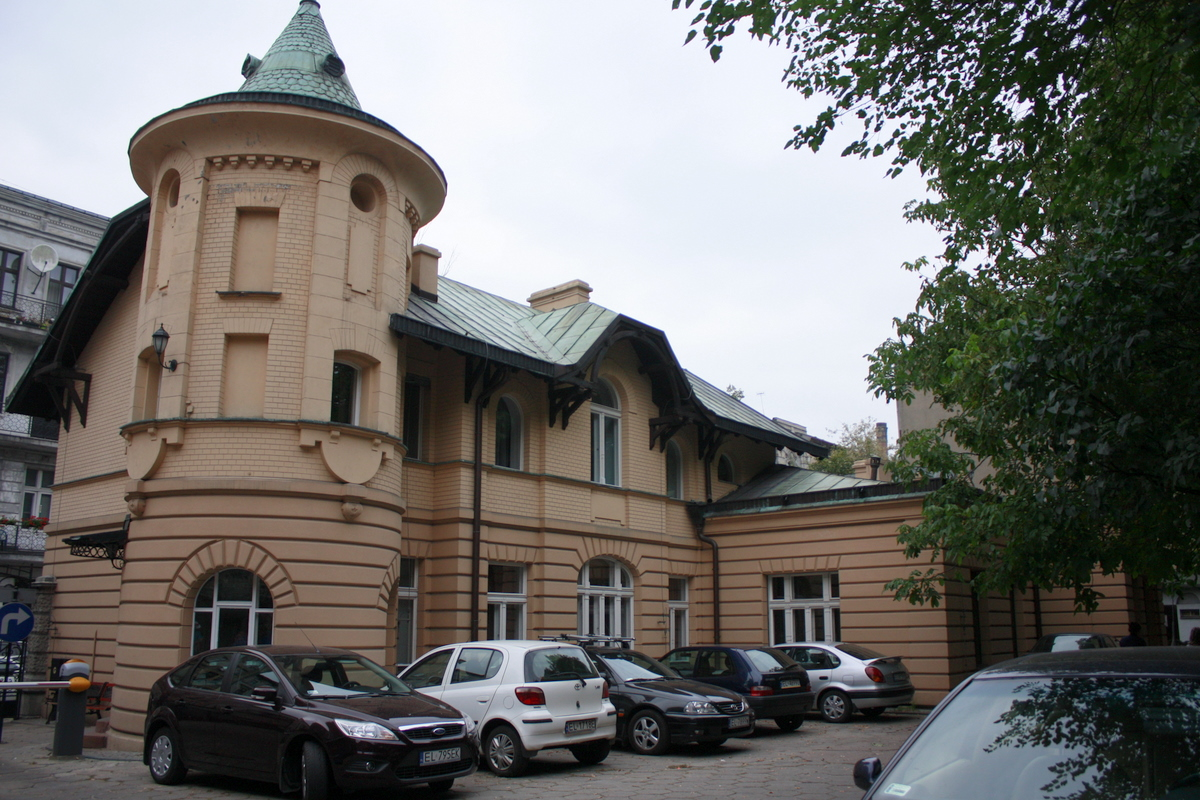 Łódź - Pałac Poznańskich, ob. Akademia Muzyczna